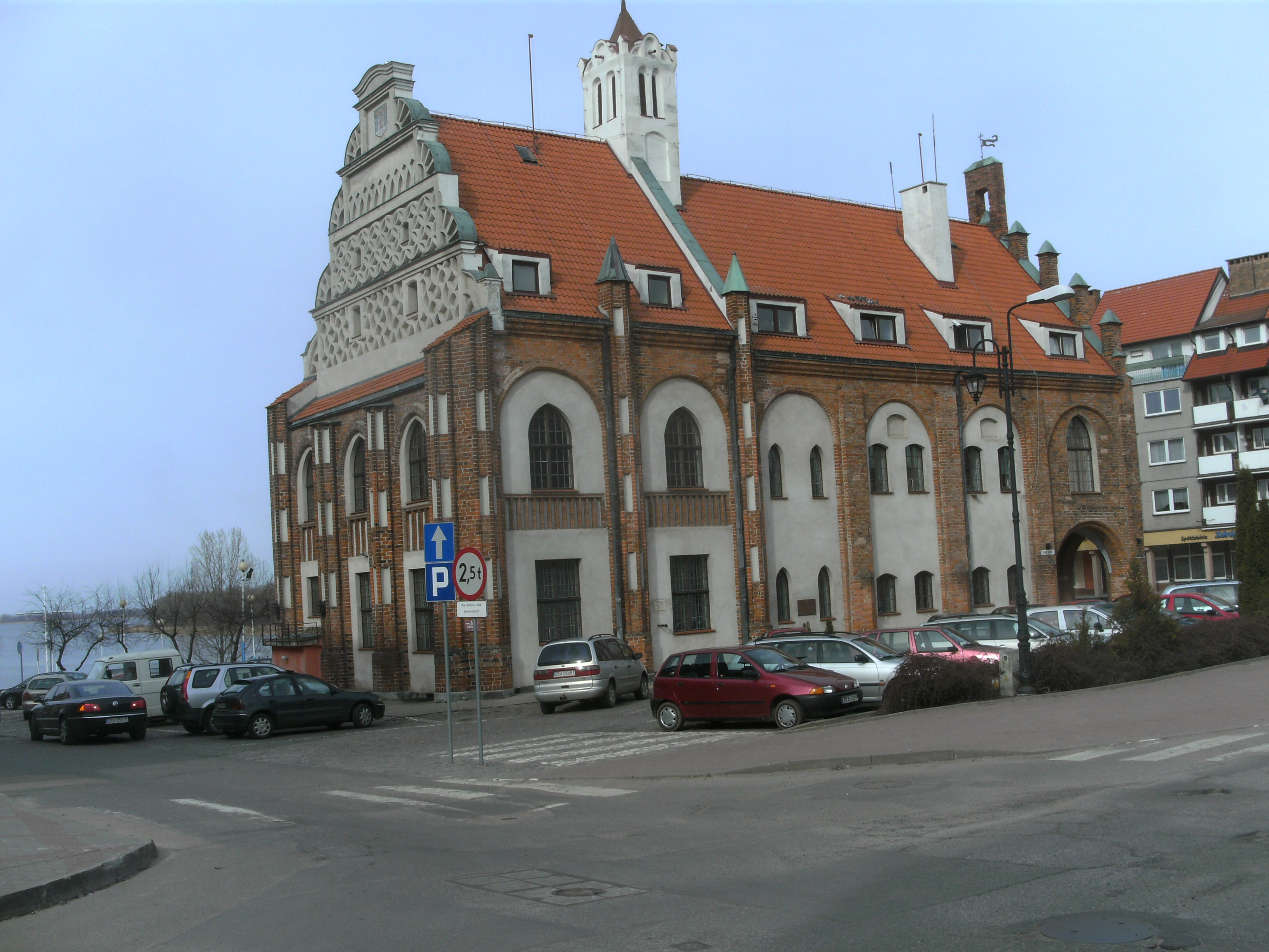 Cammin i. Pom., Rathaus, Rückansicht